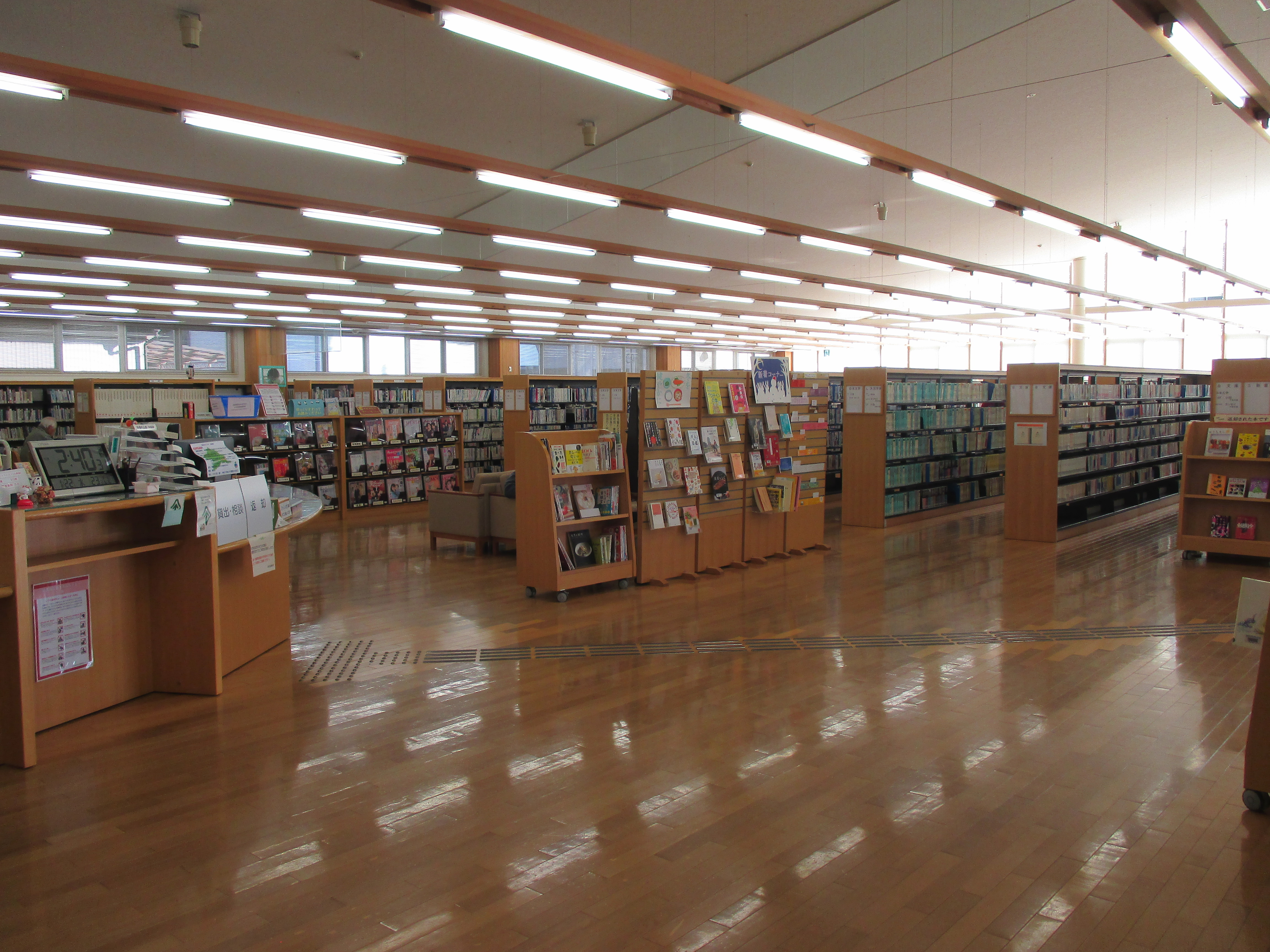 新町図書館の一般開架